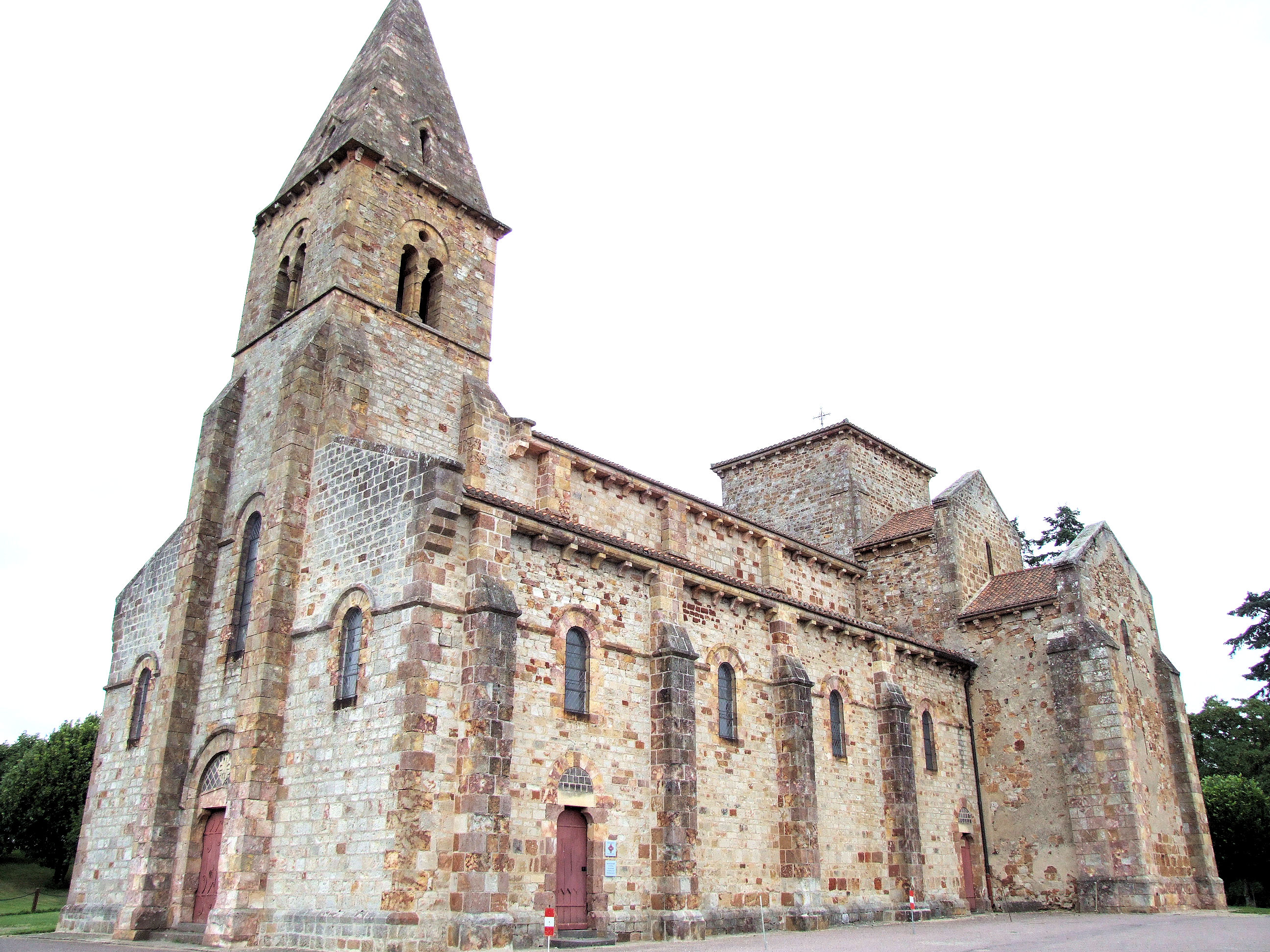 Saint-Désiré - Eglise Saint-Désiré